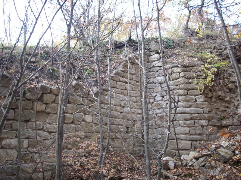 Част от руините на византийската крепост между селата Долна Кабда и Горна Кабда, област Търговище, Република България